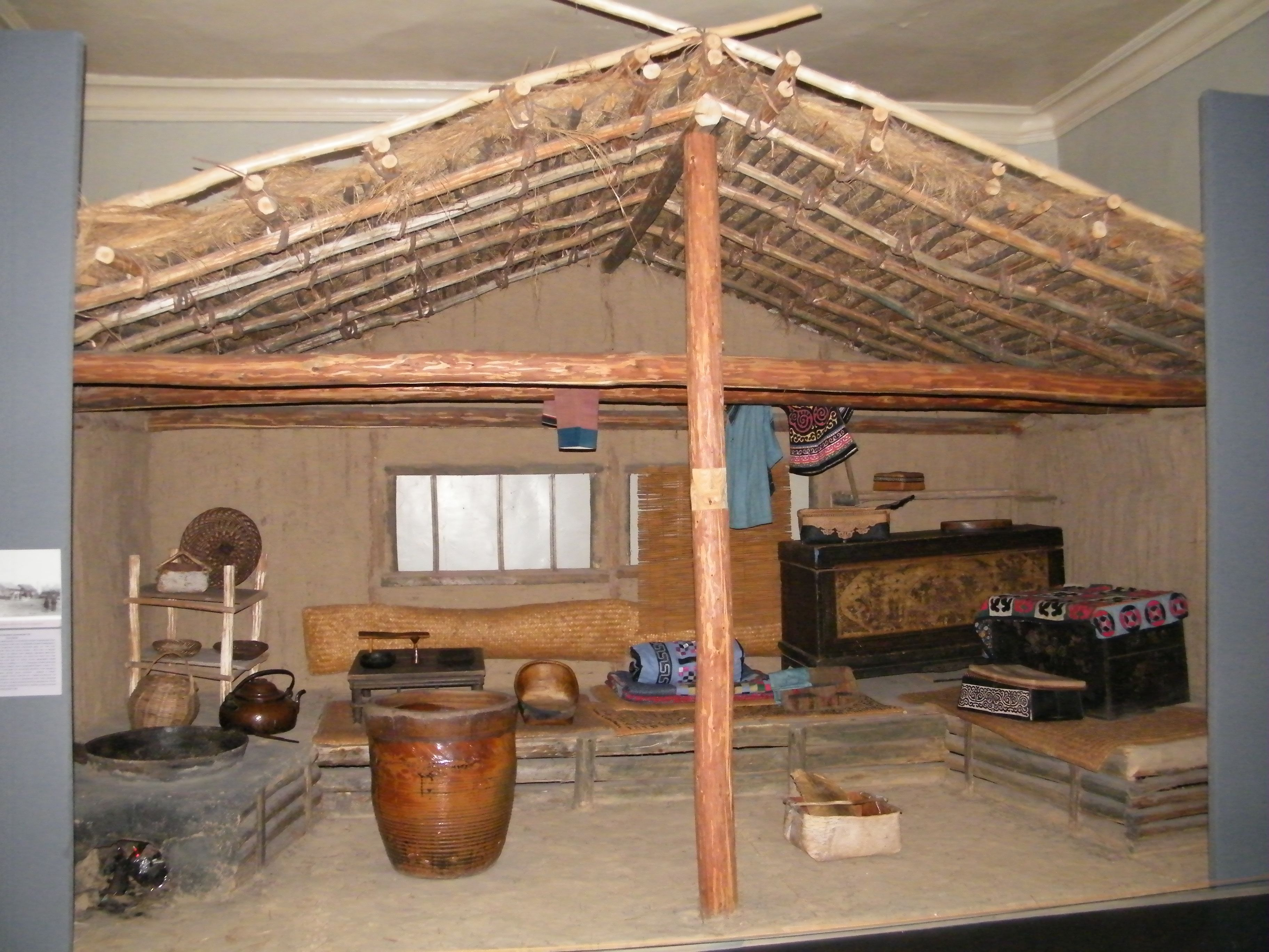 Зимнее нанайское жилище